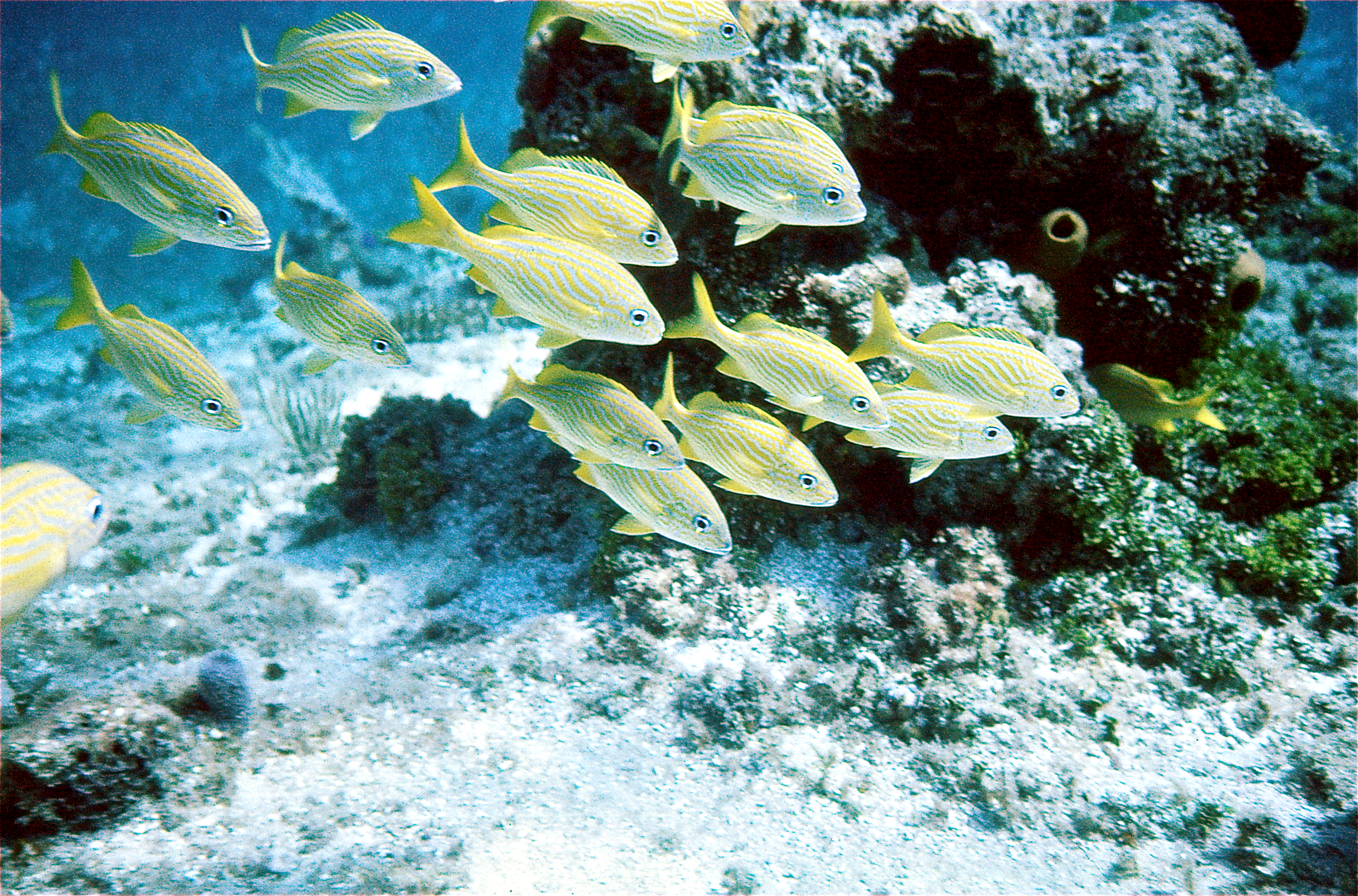 Cozumel, Quintana Roo, MEXICO Scanned Slide from 1995